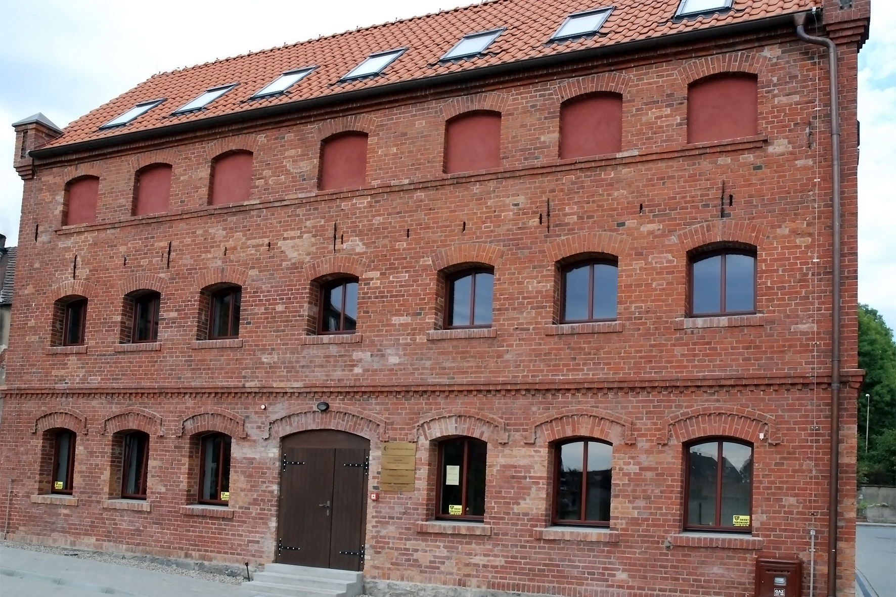 Drawno - spichlerz 01.2006.